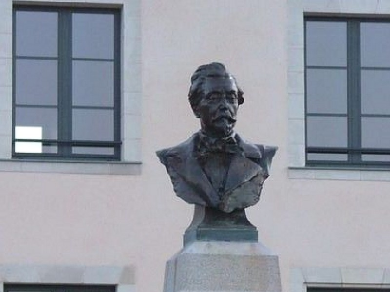 buste d'Armand Brousse devant la Mairie de Saint Melaine sur Aubance